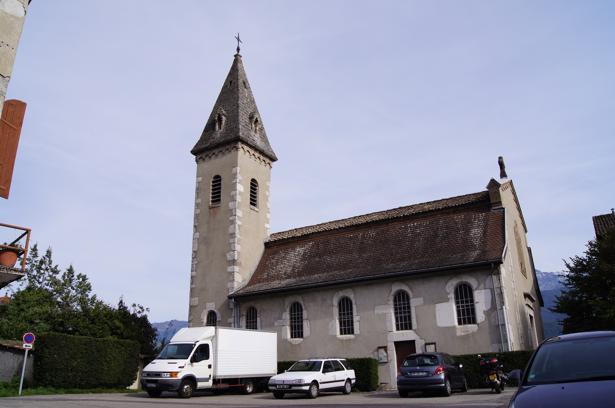 Eglise ST NAZAIRE LES EYMES